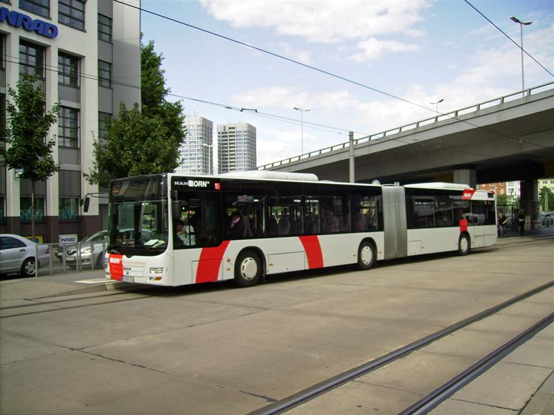 MZ-RN 262 MZ HBF West